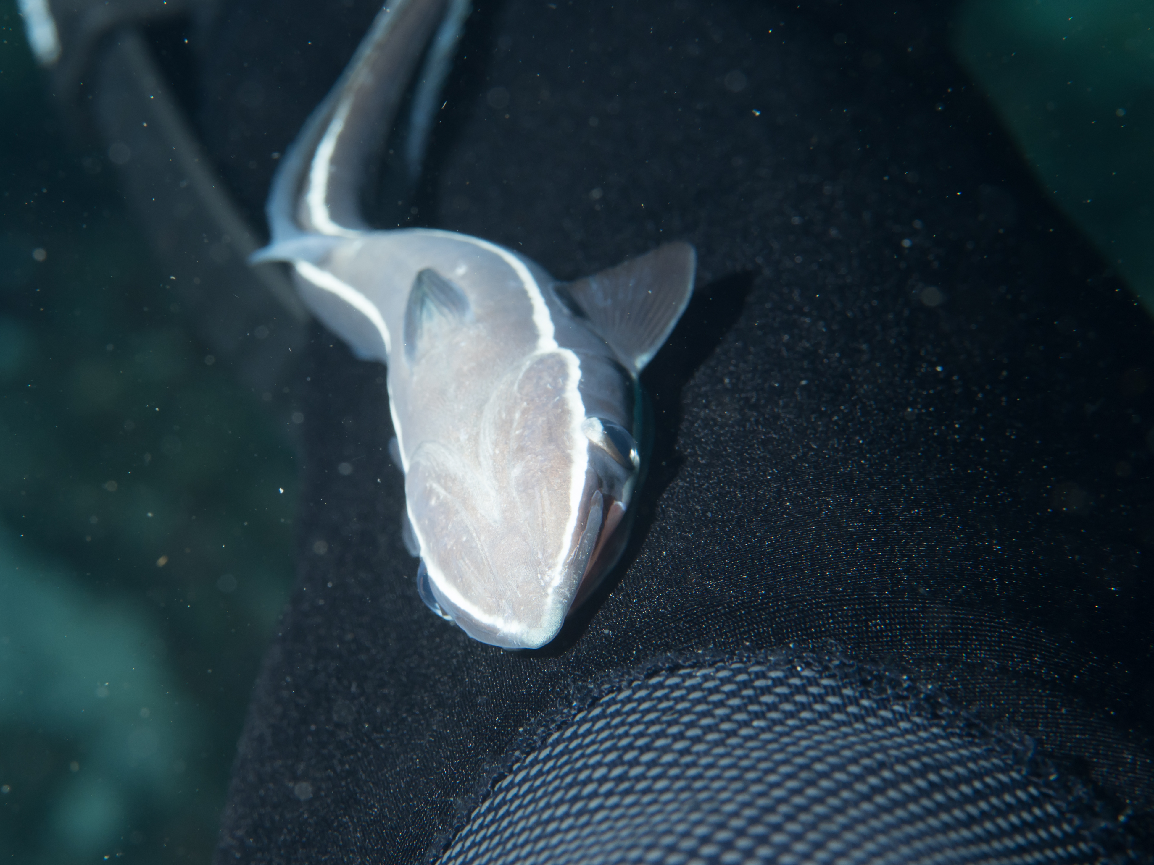 Indonesia / Raja ampat 2019 - Sharksucker (Echeneis naucrates)